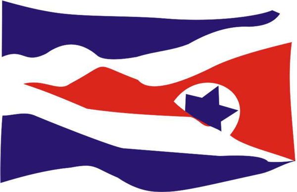 Site da Prefeitura Municipal de Sacramento (